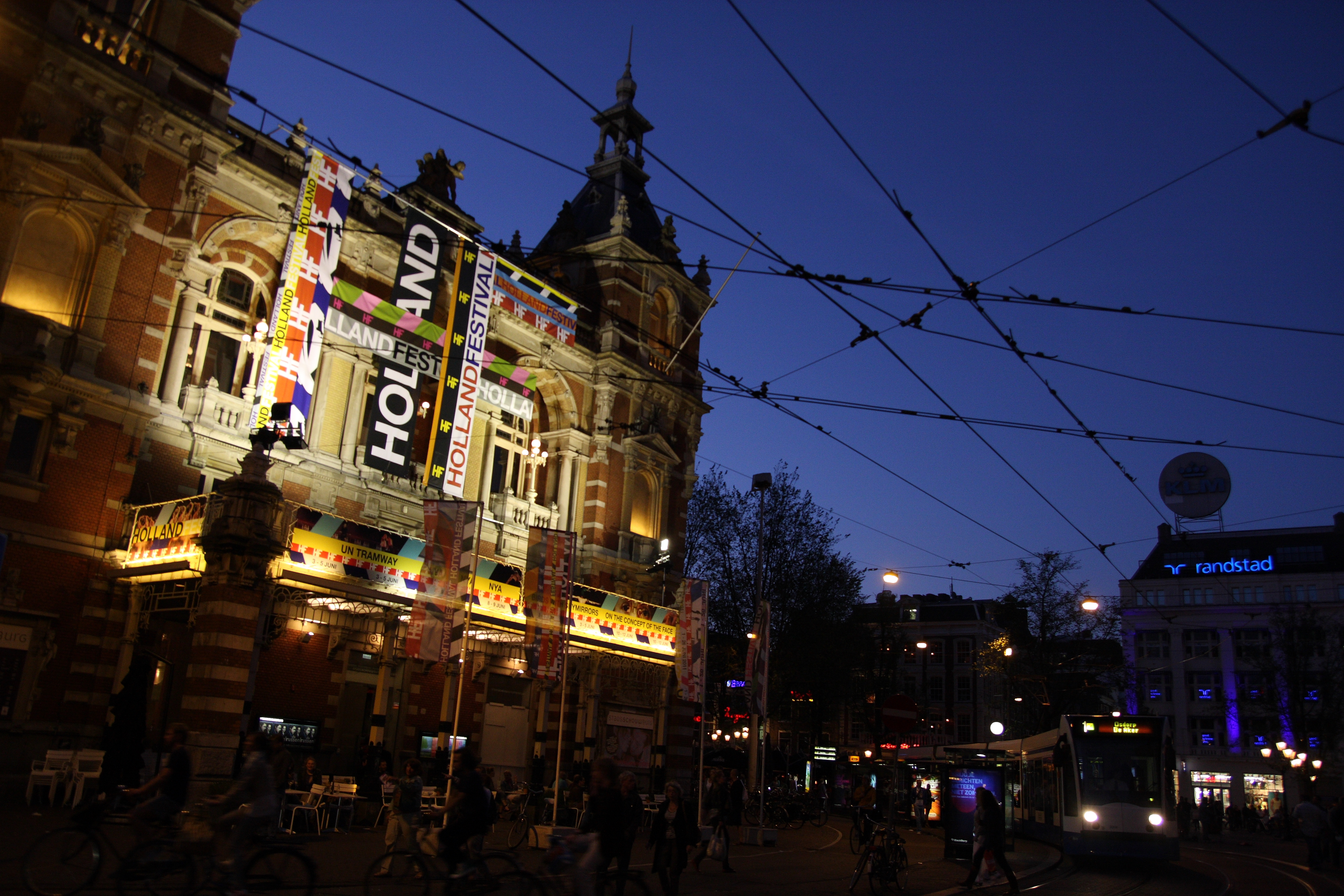 Leidseplein & Stadsschouwburg, Amsterdam, Netherlands